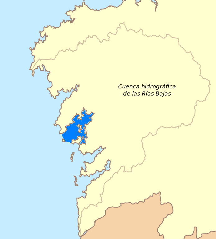 Ría de Arousa